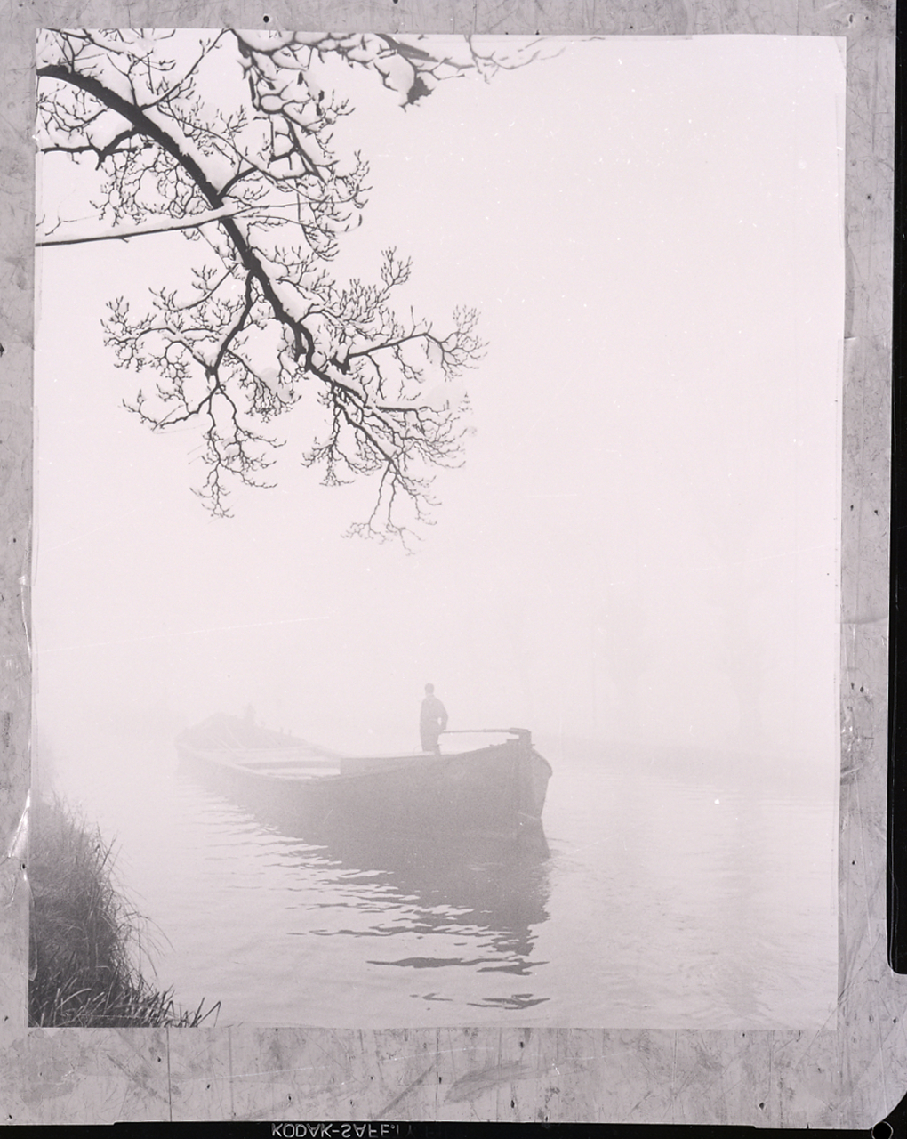 Serie fotografica : Roma, 1979 / Paolo Monti. - Buste: 2, Fototipi: 2 : Negativo b/n, gelatina bromuro d'argento/ pellicola ; 10x10, 10x12. - ((Serie costituita da 2 buste sciolte di negativi identificati con i nn.: 22170, 22178. - Sulla buste iscrizioni didascaliche e documentarie manoscritta a penna e a pennarello. - La busta identificata con il n. 22178 contiene una diapositiva.